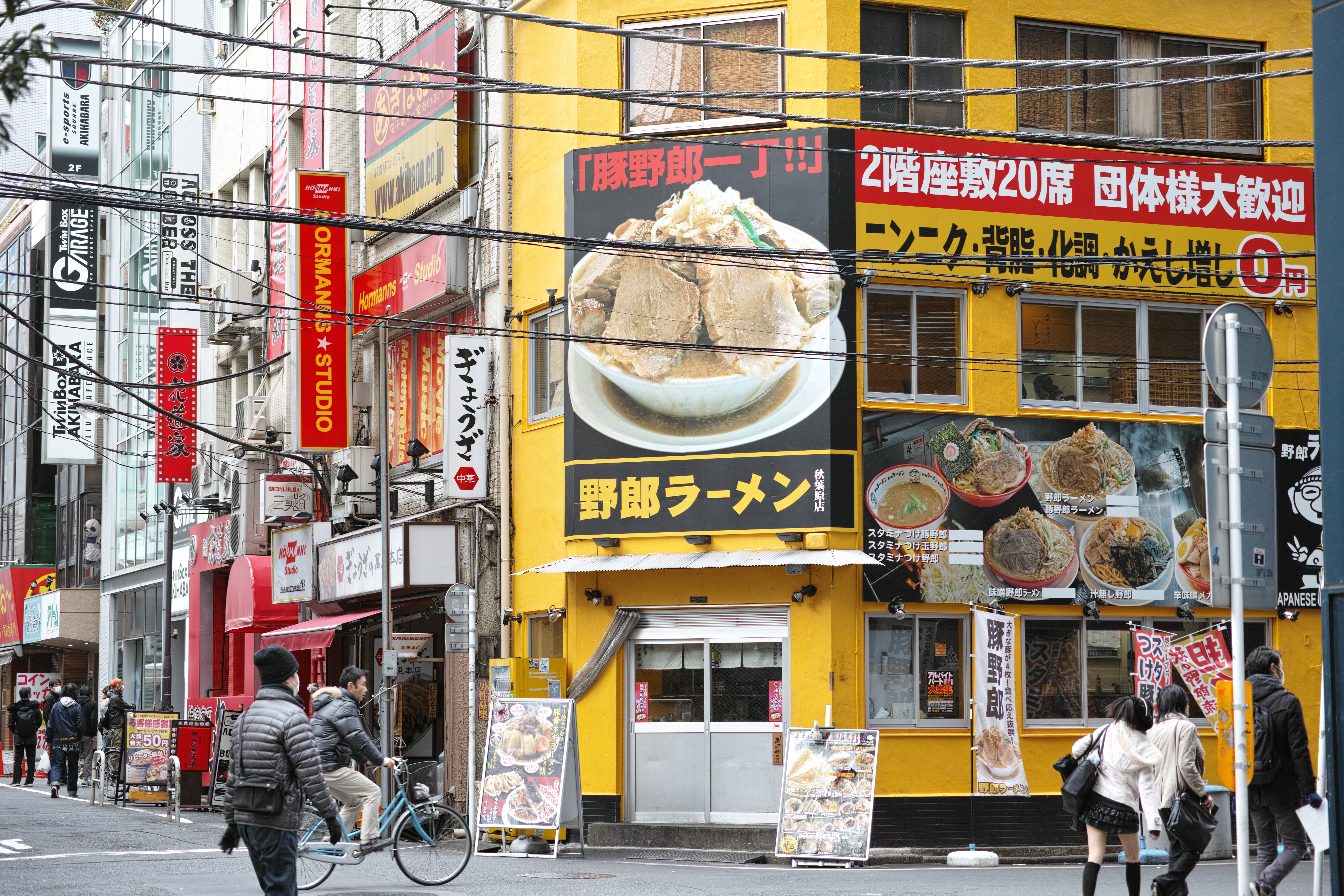 Yarō Ramen